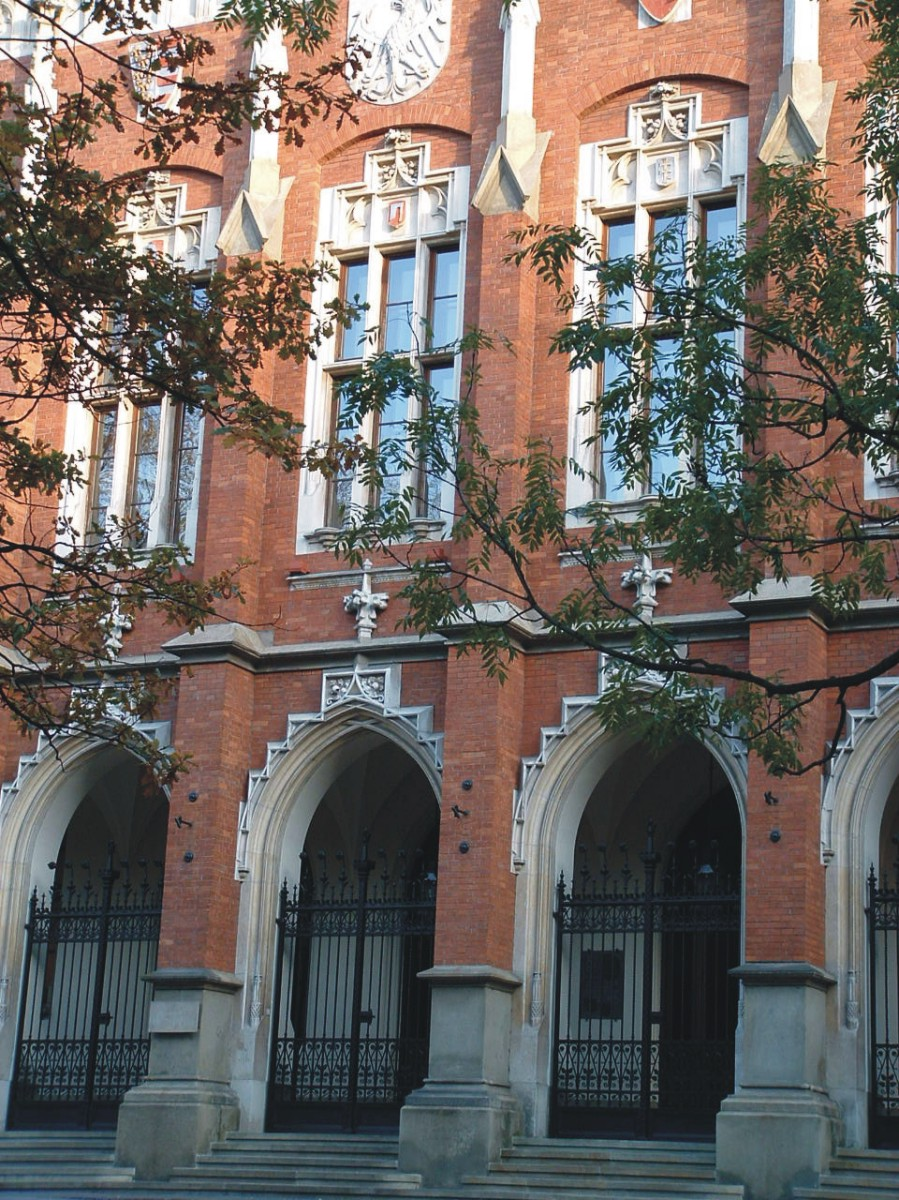 Uniwersytet Jagielloński - Collegium Novum 23-10-2004r.